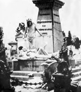 Tumba de Gerardo Barrios en el Cementerio General de la Ciudad de Guatemala